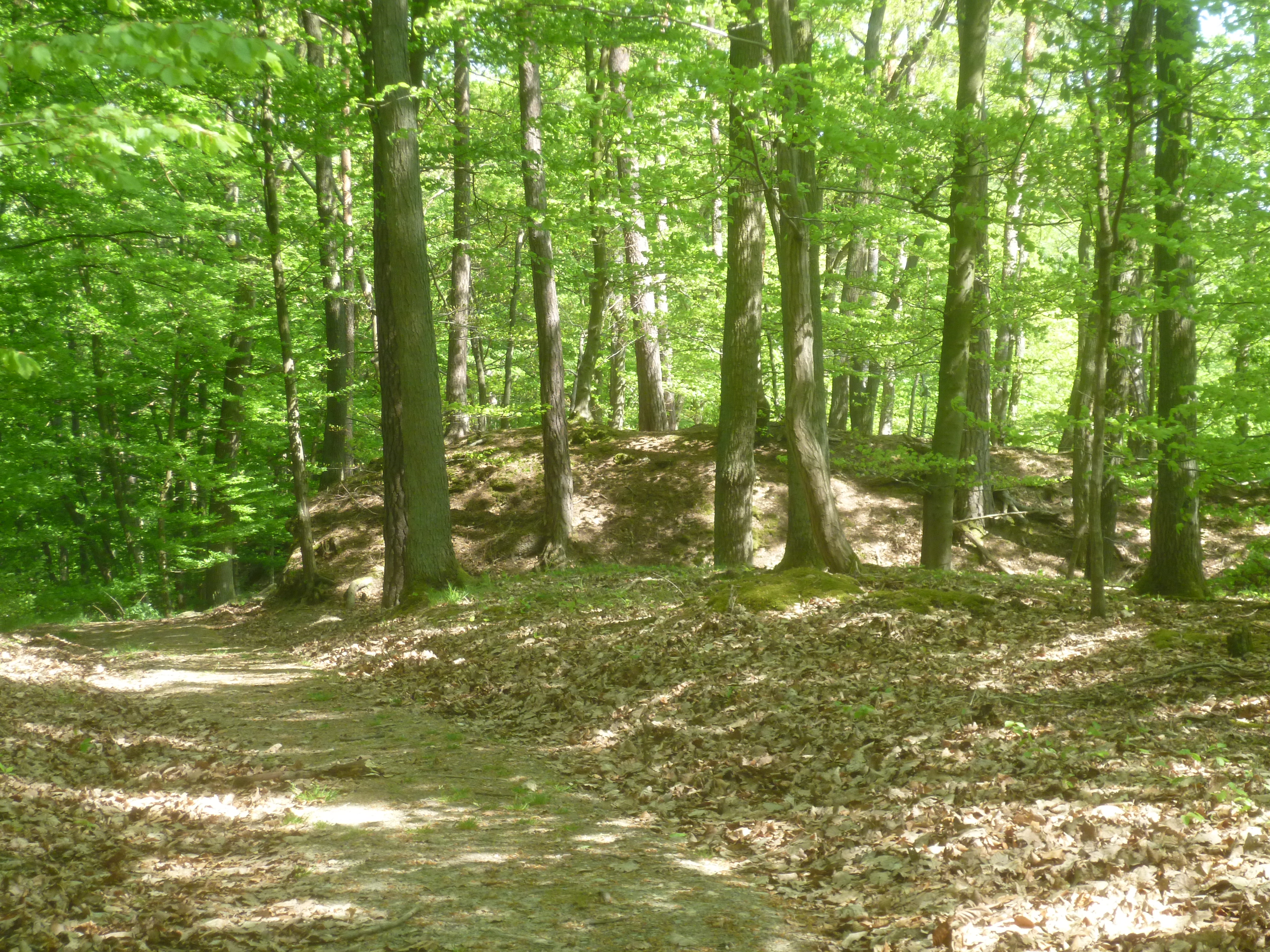 Dritter Abschnittswall der Burg Heidenpütz